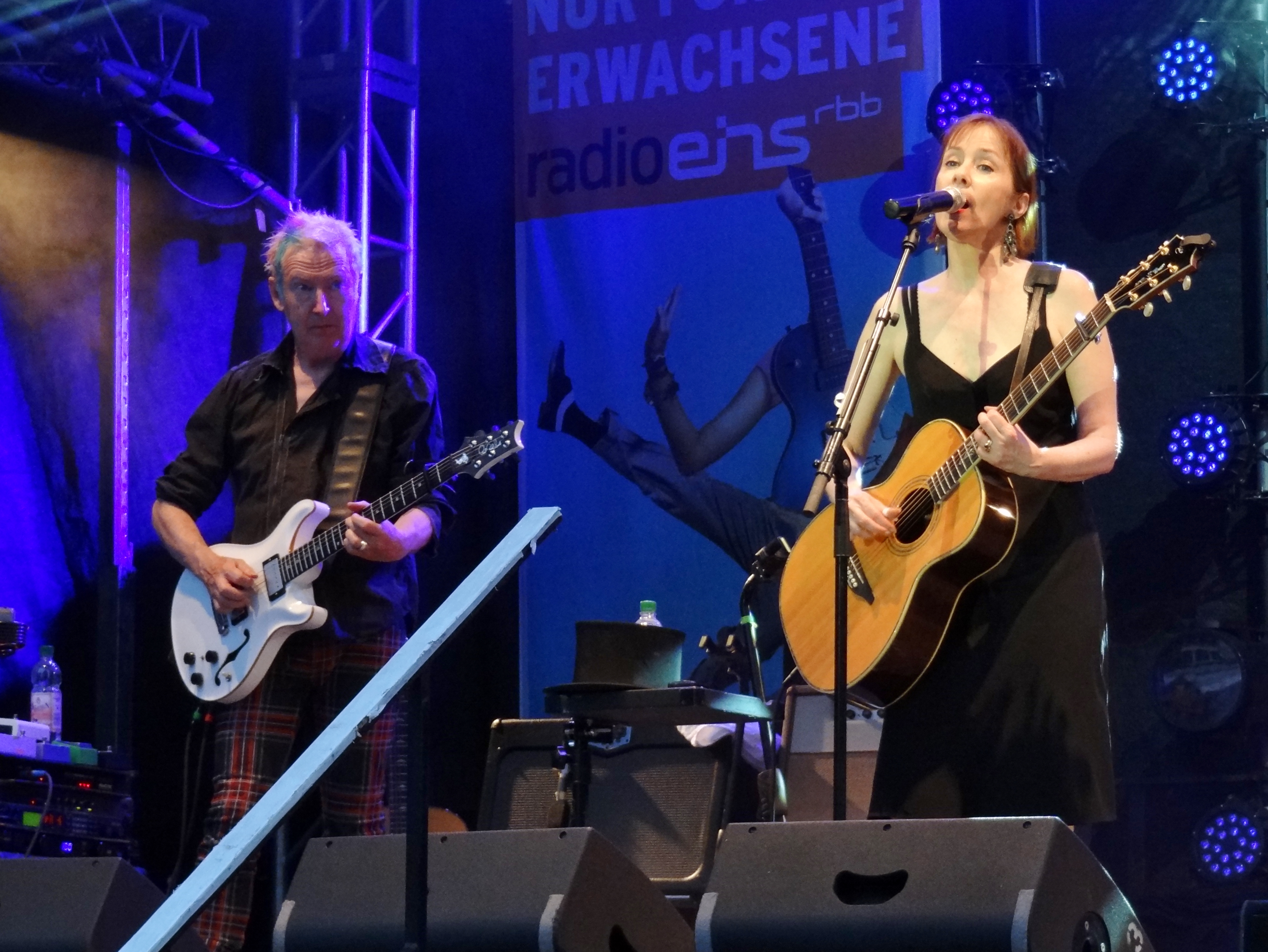 Suzanne Vega mit Gerry Leonard beim 13. Inselleuchten-Festival in Marienwerder, Land Brandenburg, Deutschland